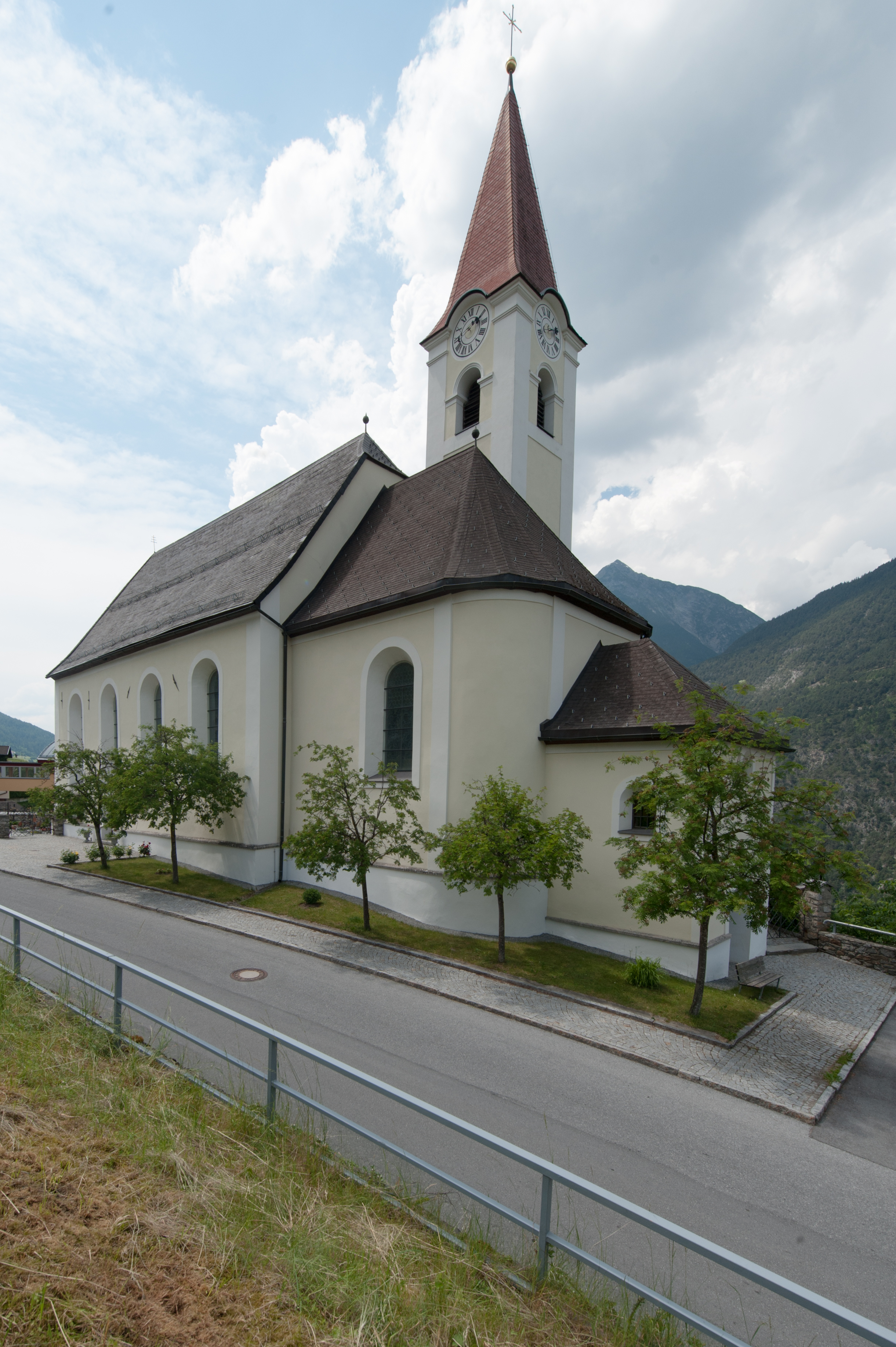 Wiki takes Nordtiroler Oberland: Kath. Pfarrkirche Mariae Sieben Schmerzen mit Friedhof